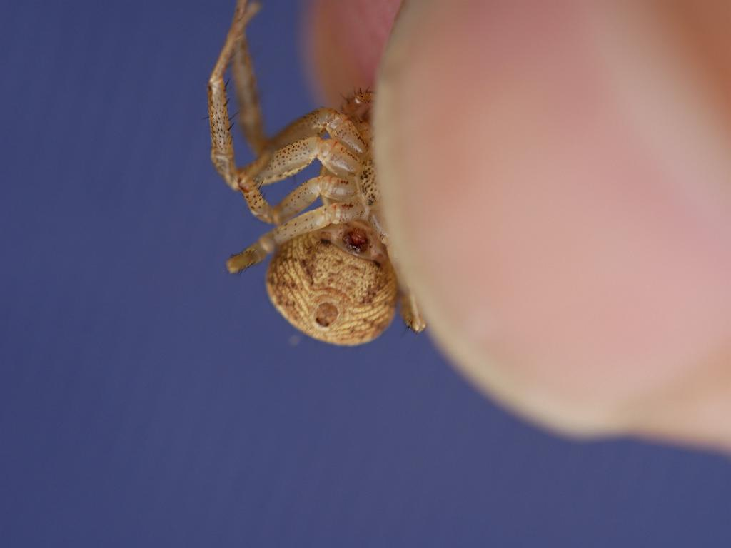 2019/05/29 和歌山県田辺市：Tanabe City. Wakayama Pref. Japan